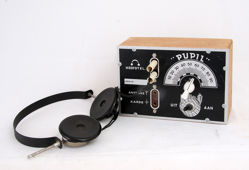 De originele Maxwell Pupil Bron